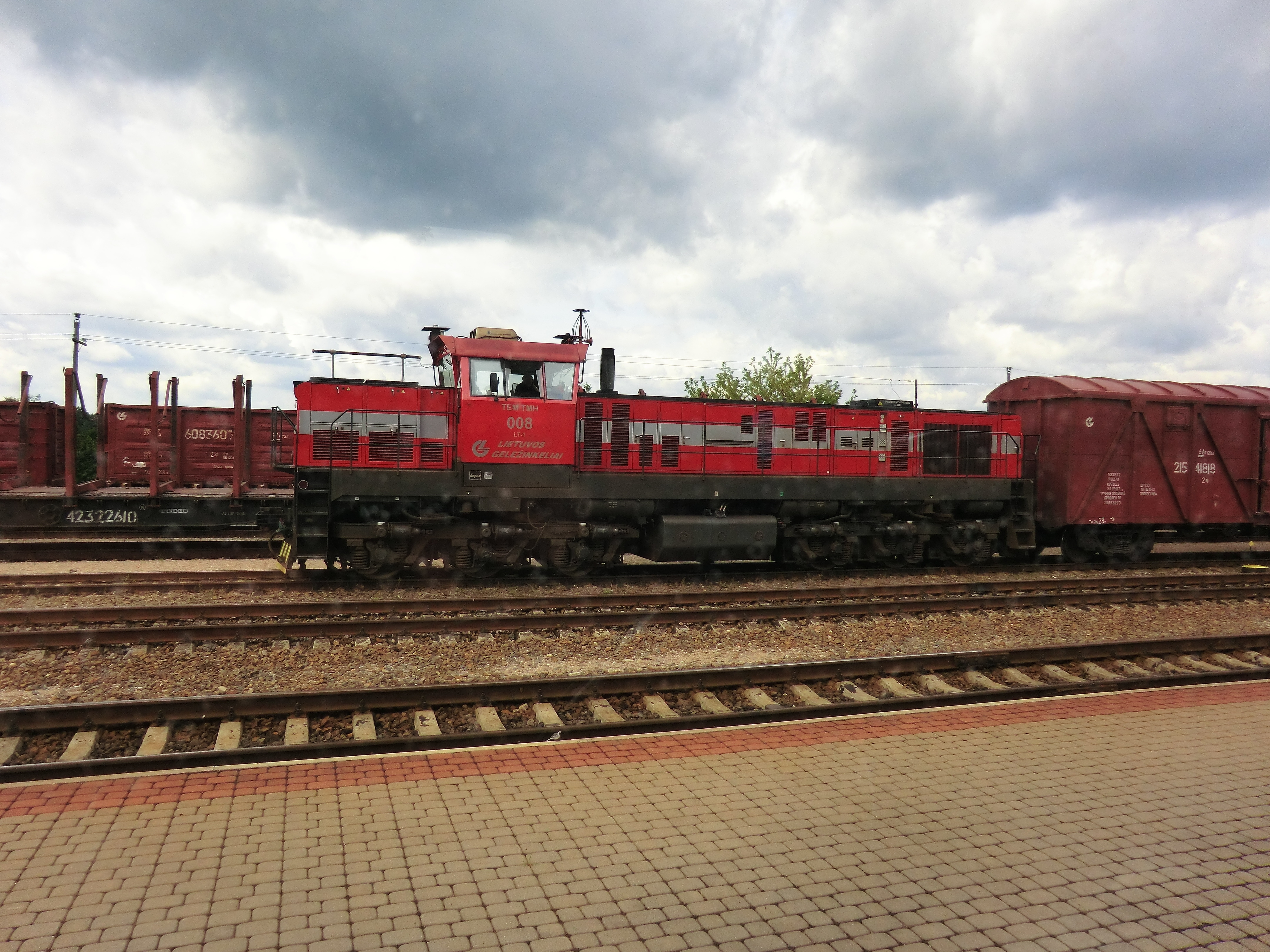 Švenčionėliai, Lithuania